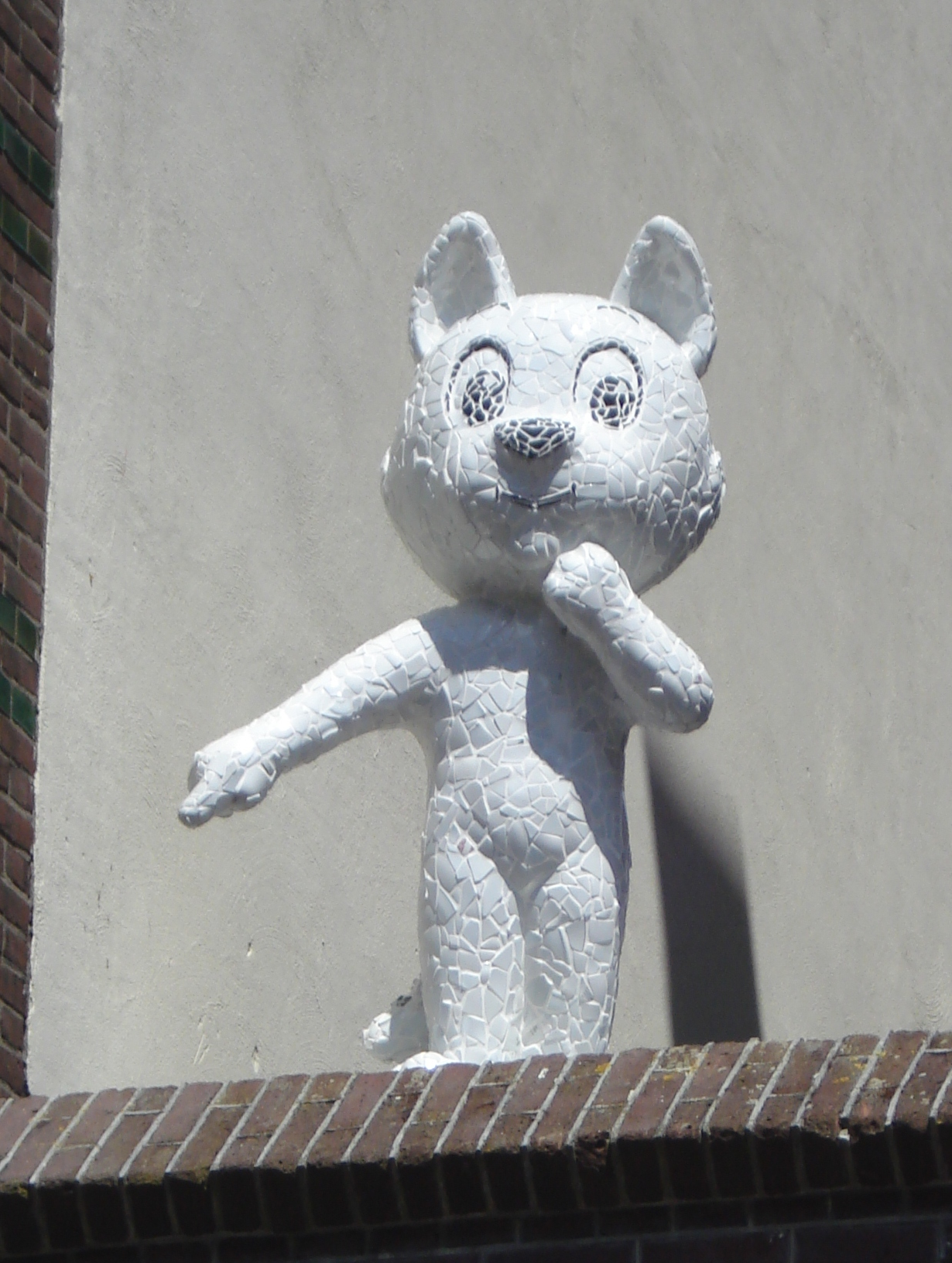 Rotterdam, Noordereiland, Thorbeckestraat. Kunstwerk "Tom Poes" van Tamyra & Saskia Meesters. The Netherlands. The photographical reproduction of this work is covered under the article 18 of the Dutch copyright law, which states that “it is not an infringement of copyright to reproduce and publish pictures of a work, as meant in article 10, first paragraph, under 6°[1] or of an architectural work as meant in article 10, first paragraph, under 8°[2], which are made to be permanently located in a public place, as long as the work is depicted as it is located in the public space. Where incorporation of a work in a compilation is concerned, not more than a few of the works of the same author may be included”. [1] drawings, paintings, works of architecture and sculpture, lithographs, engravings and the likes [2] drafts, sketches and three-dimensional works relating to architecture, geography, topography or other sciences Note that photographs are not included in Item 6. They are separately listed at Item 9 and are therefore not covered by FOP. See COM:CRT/Netherlands#Freedom of panorama for more information. .